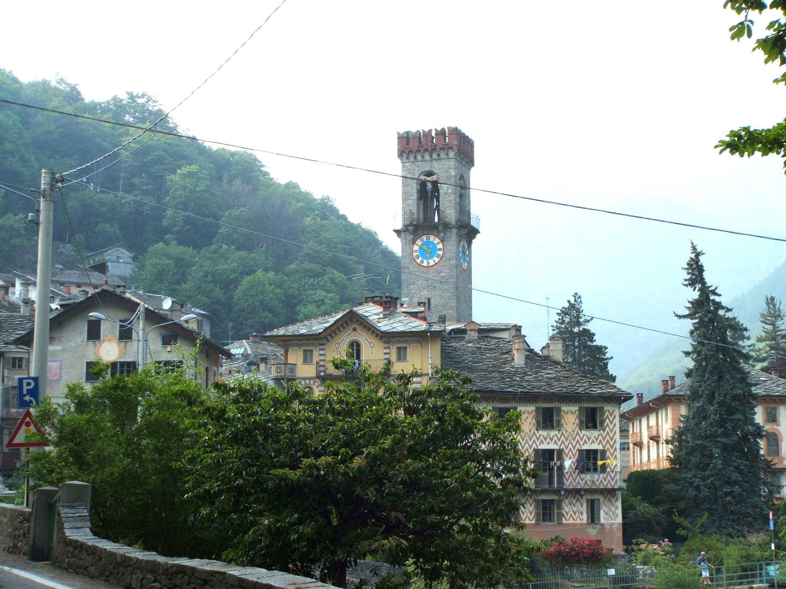 Rosazza, comune in provincia di Biella, Piemonte, Italia - panorama